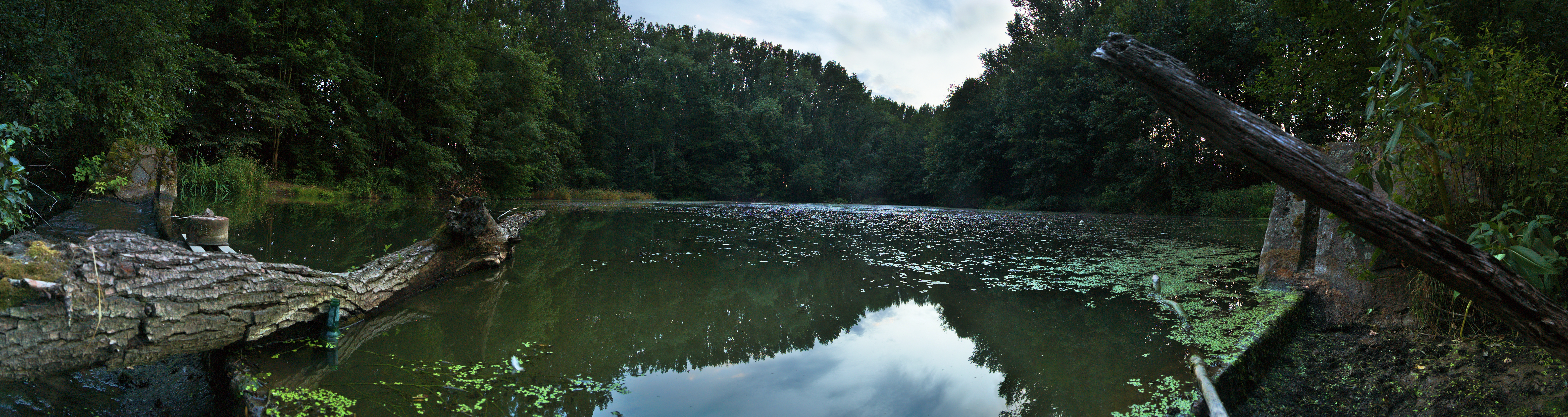 Panoramatický pohled na přírodní památku Pod zápovědským kopcem, okres Prostějov